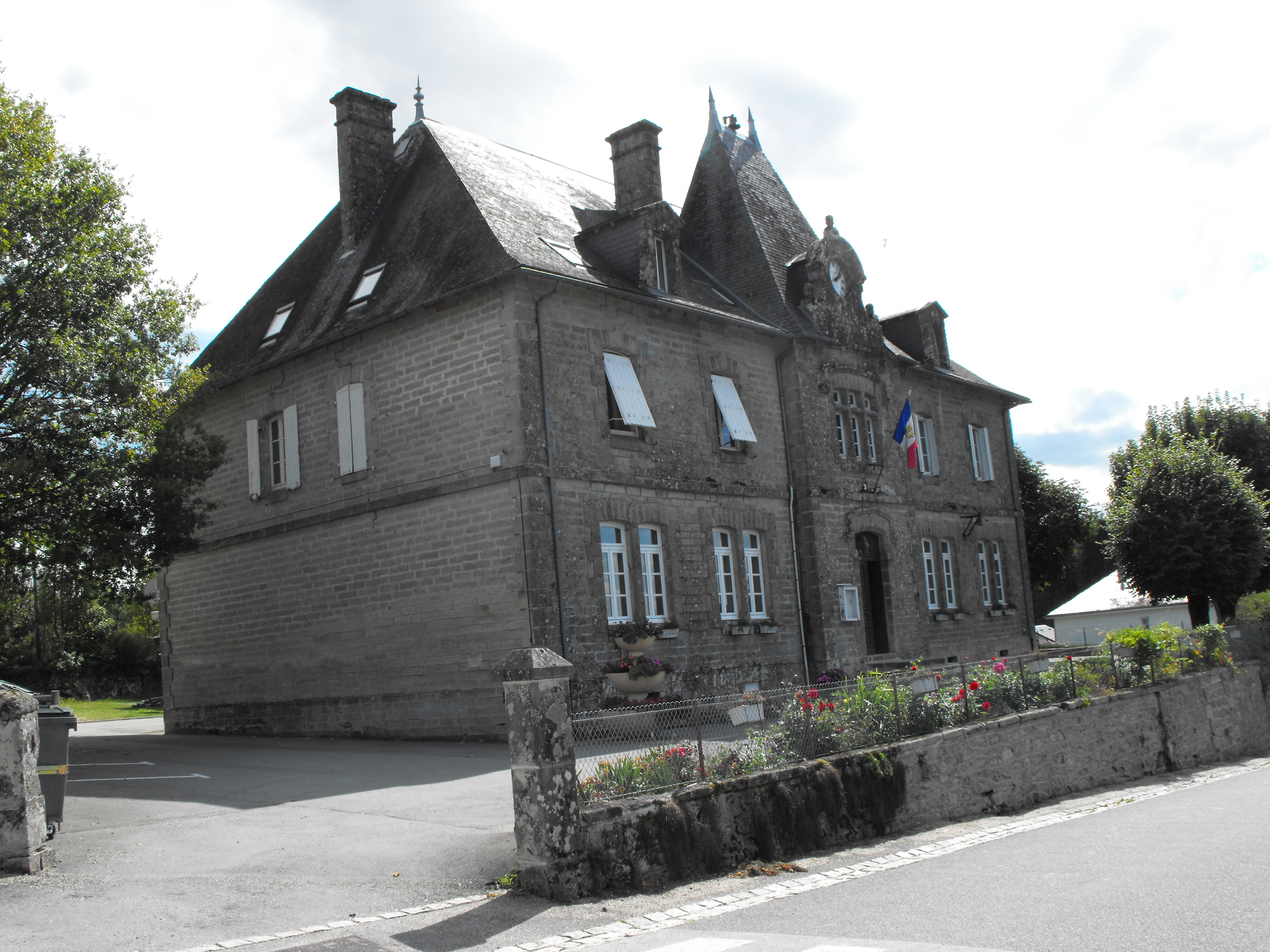 la mairie